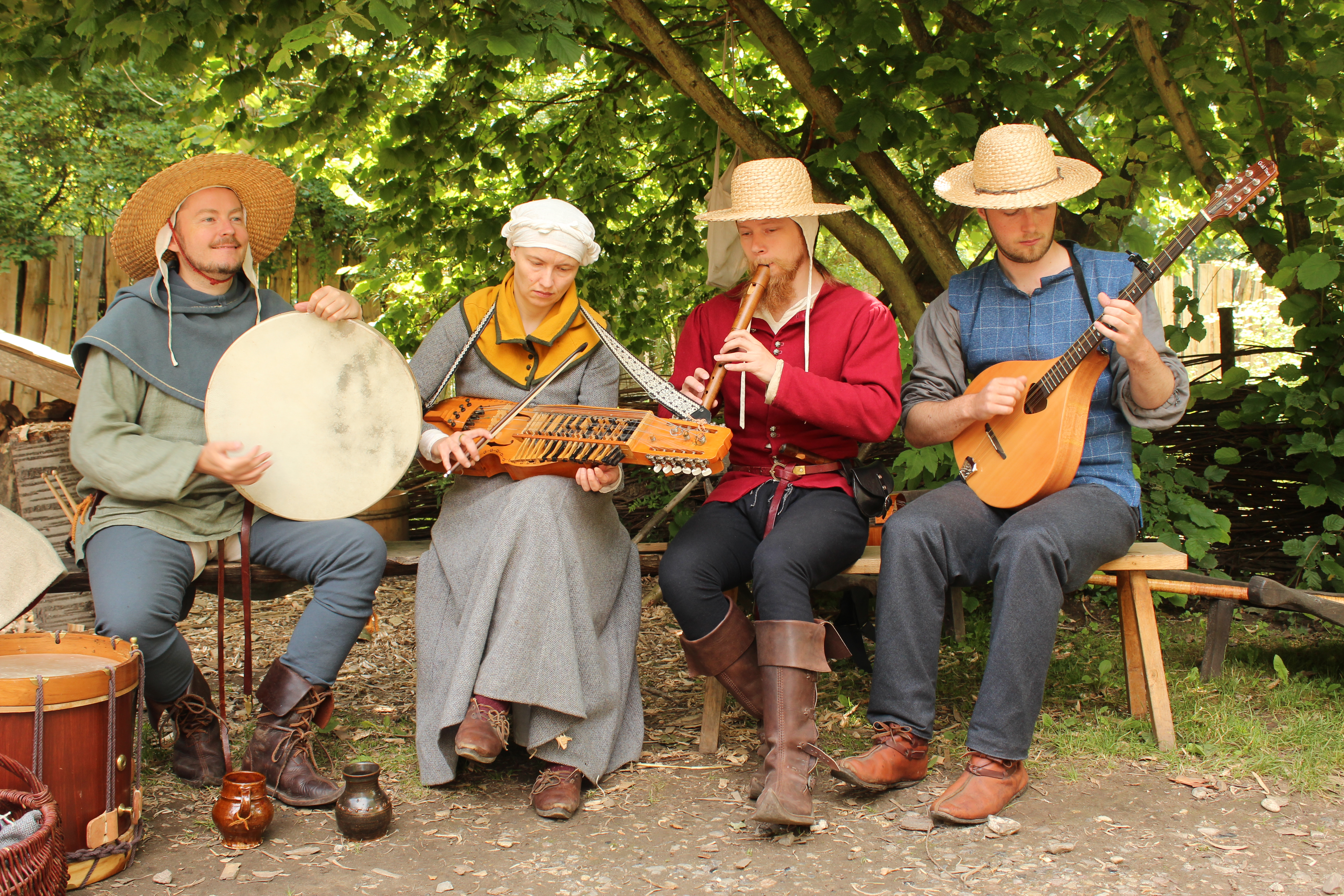 Middelaldermusikgruppen Almune bestående af (venstre mod højre): Hans Christian Molbech, Molly Granhøj, Troels Dueholm og Christian Mohr Levisen.